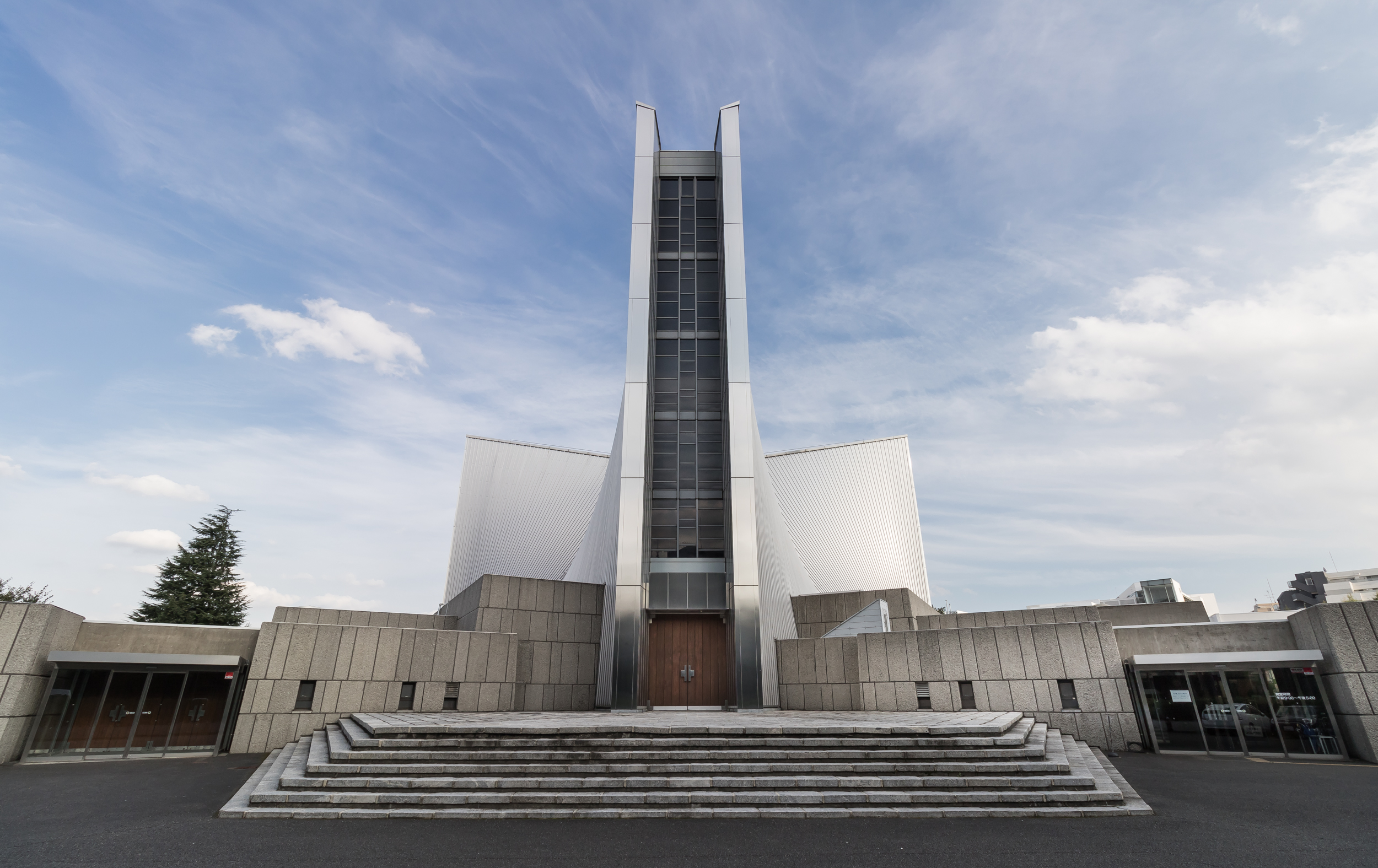 東京カテドラル聖マリア大聖堂（東京都文京区）、 Tange Kenzo.